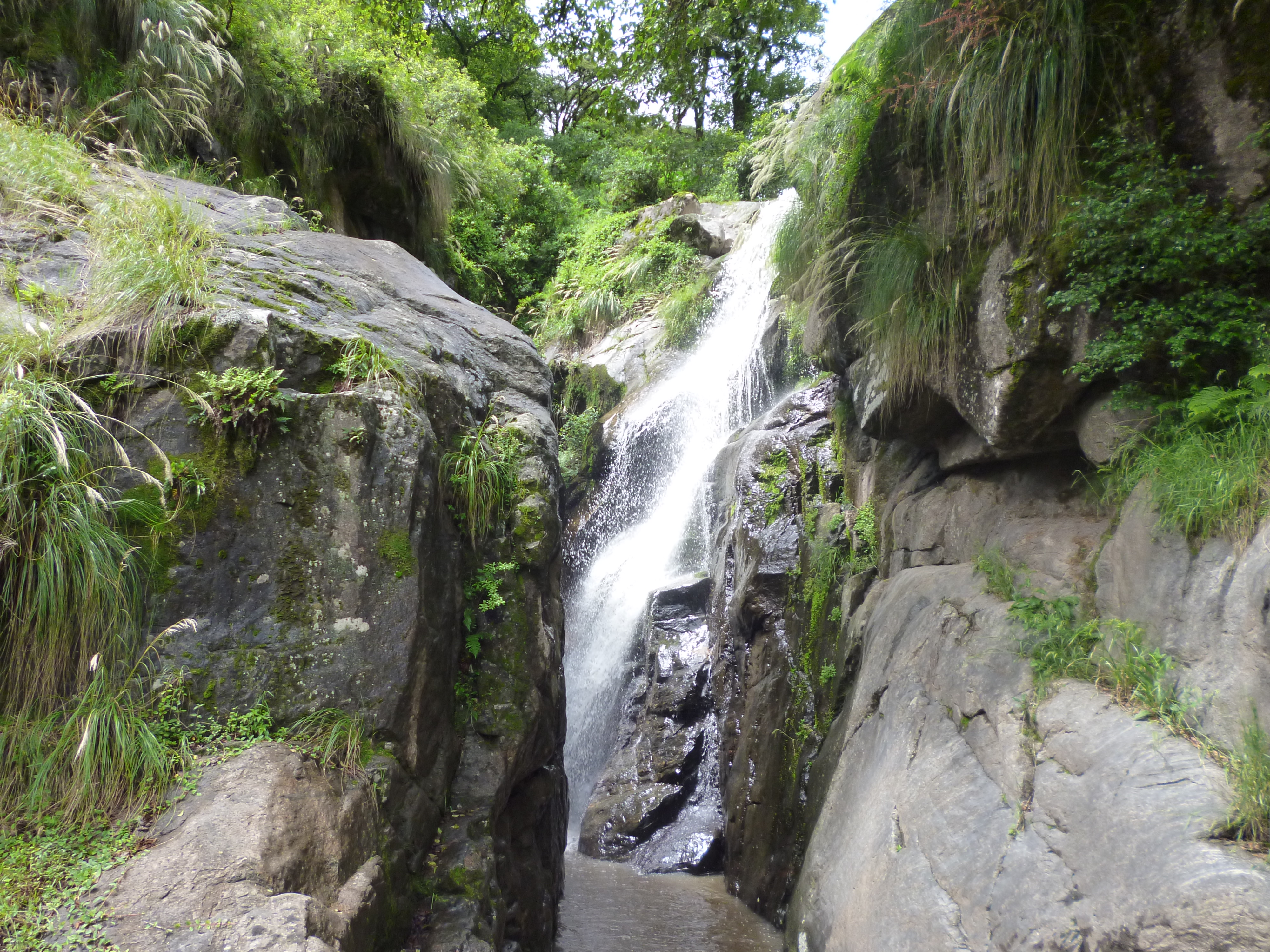 Esta es una de las tantas cascadas que se encuentran en la zona serrana de Escaba, en Tucumán.